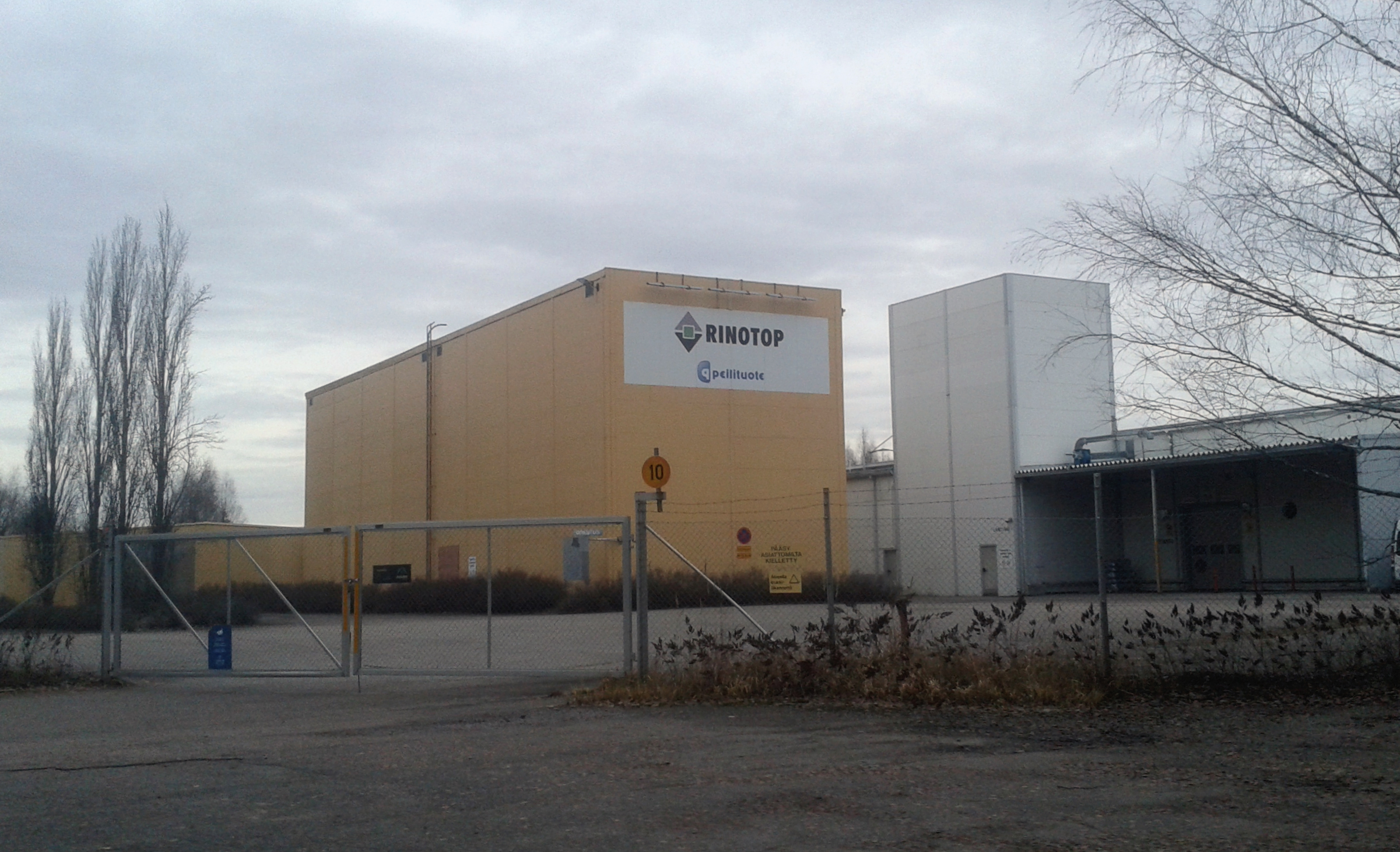 Industrial area in Röykkä.